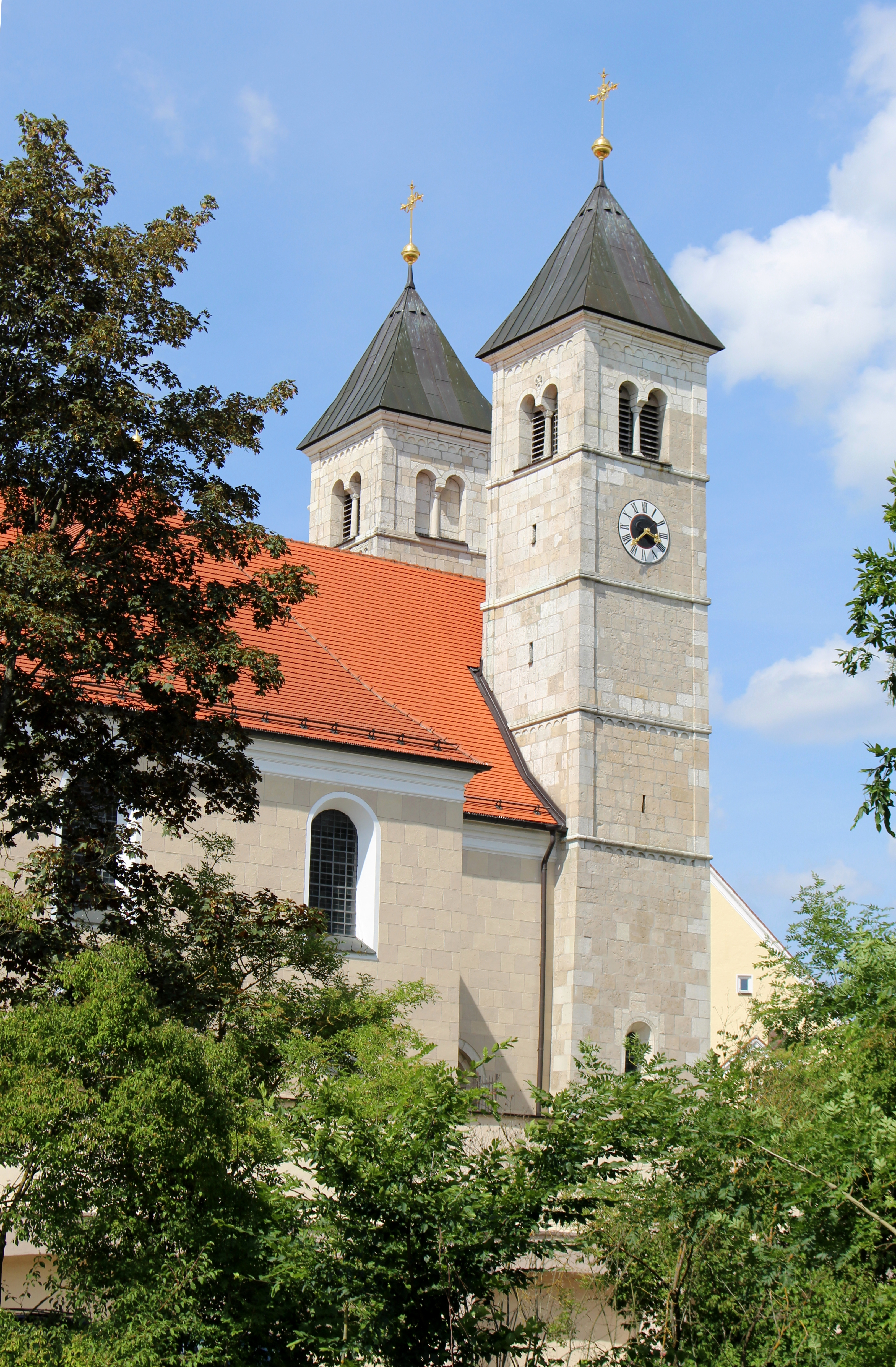 Markt Pförring, Landkreis Eichstätt, Oberbayern: Pfarrkirche St Leonhard